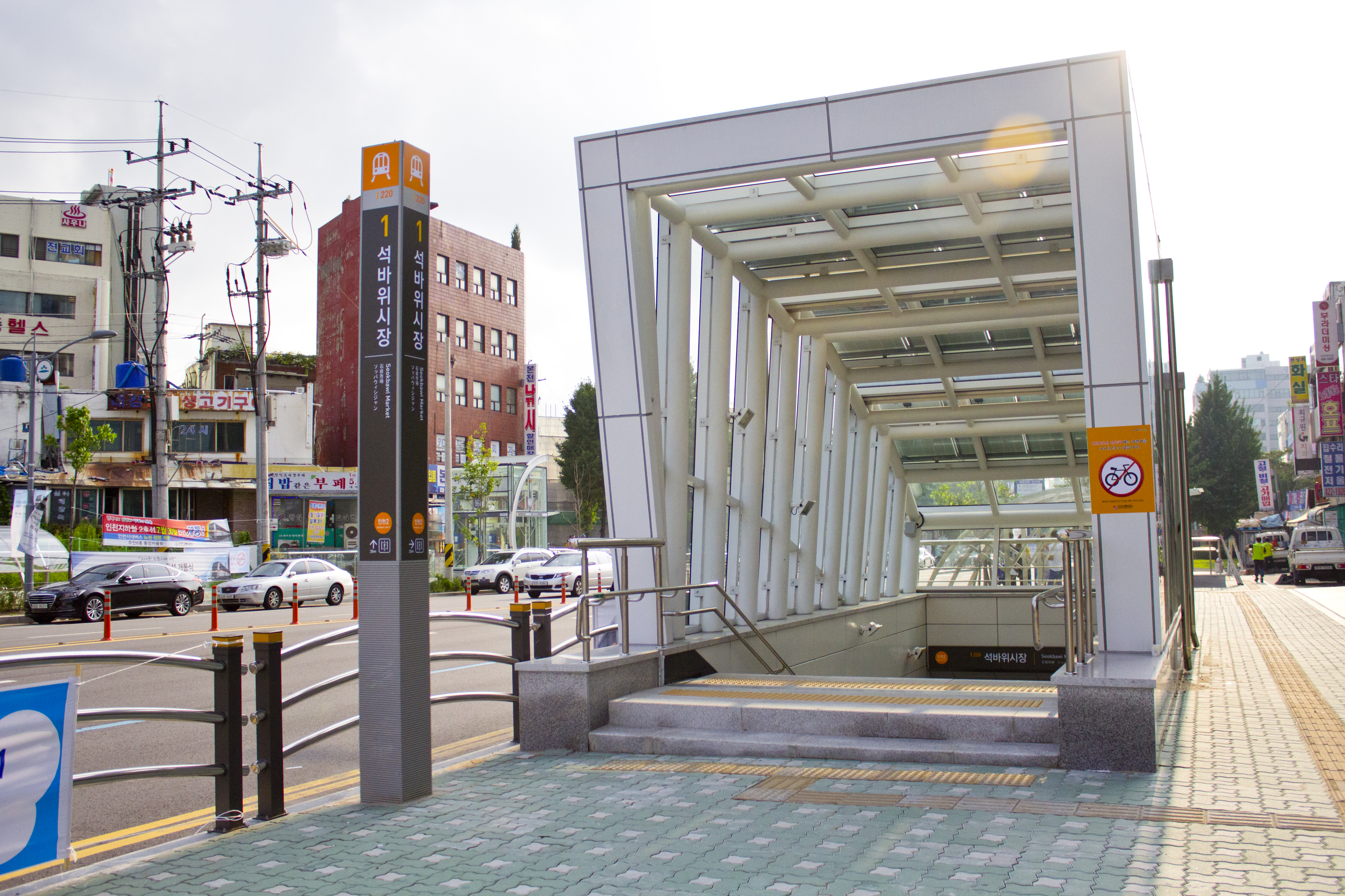 인천2호선 석바위시장역 1번출구